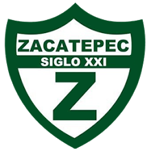 logos